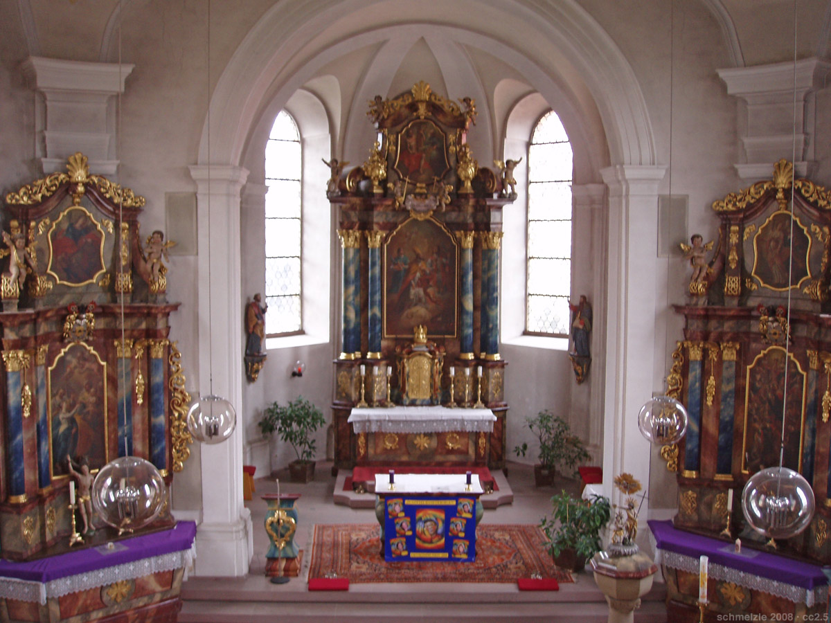 Blick zum Chor der Kirche St. Kilian in Bad Friedrichshall-Duttenberg